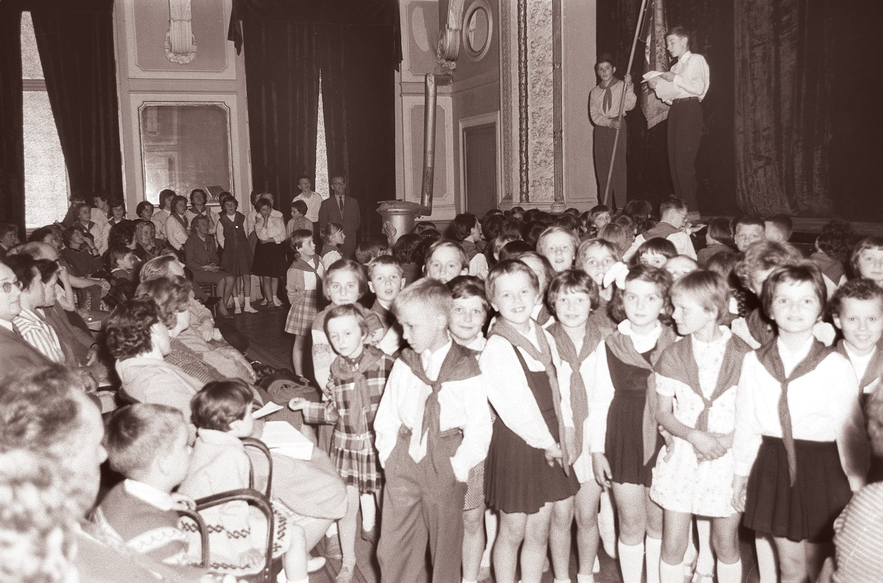 Nastop pionirskega odreda in mladinskega aktiva osnovne šole Antona Aškerca v domu JLA